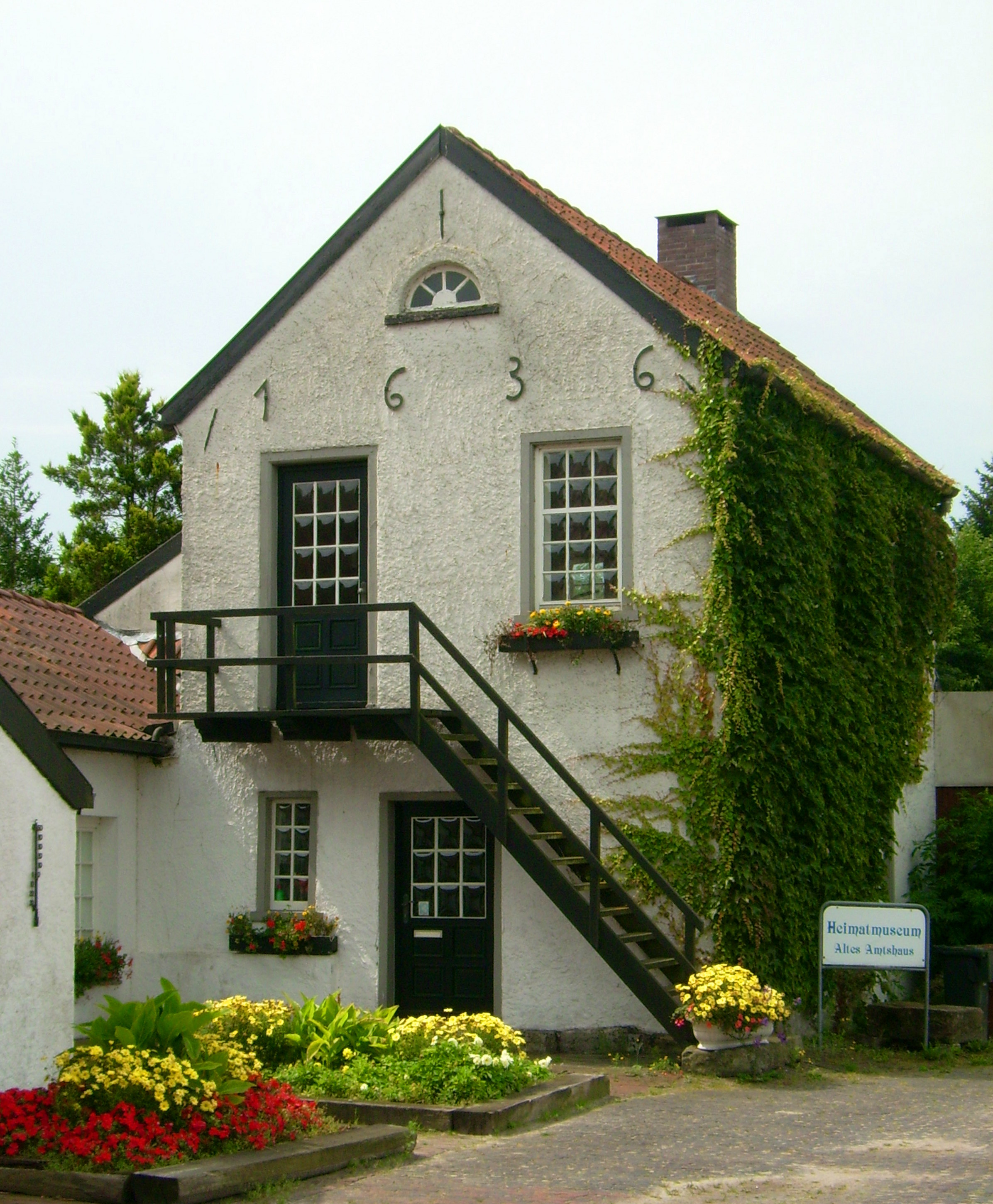 Heimatmuseum in Papenburg